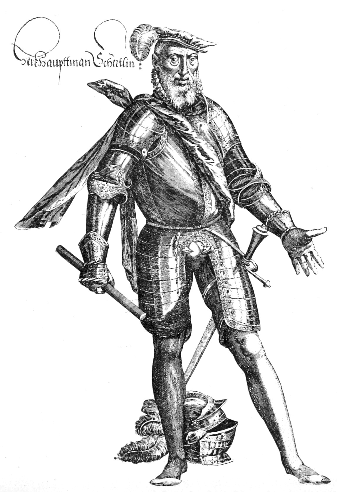 Feldhauptmann Schertlin, Herr zu Burtenbach (1496-1577), Kupferstich